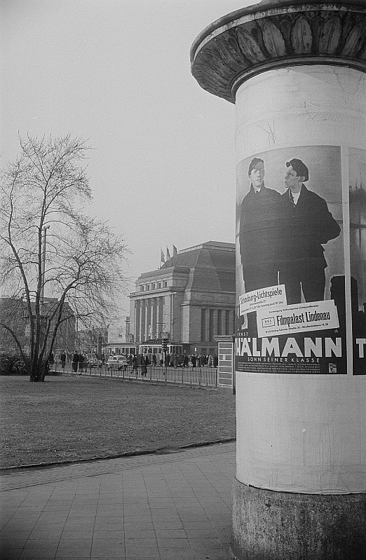 Original image description from the Deutsche Fotothek Bild Litfaßsäule mit Filmplakaten für "Ernst Thälmann - Sohn seiner Klasse", im Hintergrud der Hauptbahnhof sowie Passanten